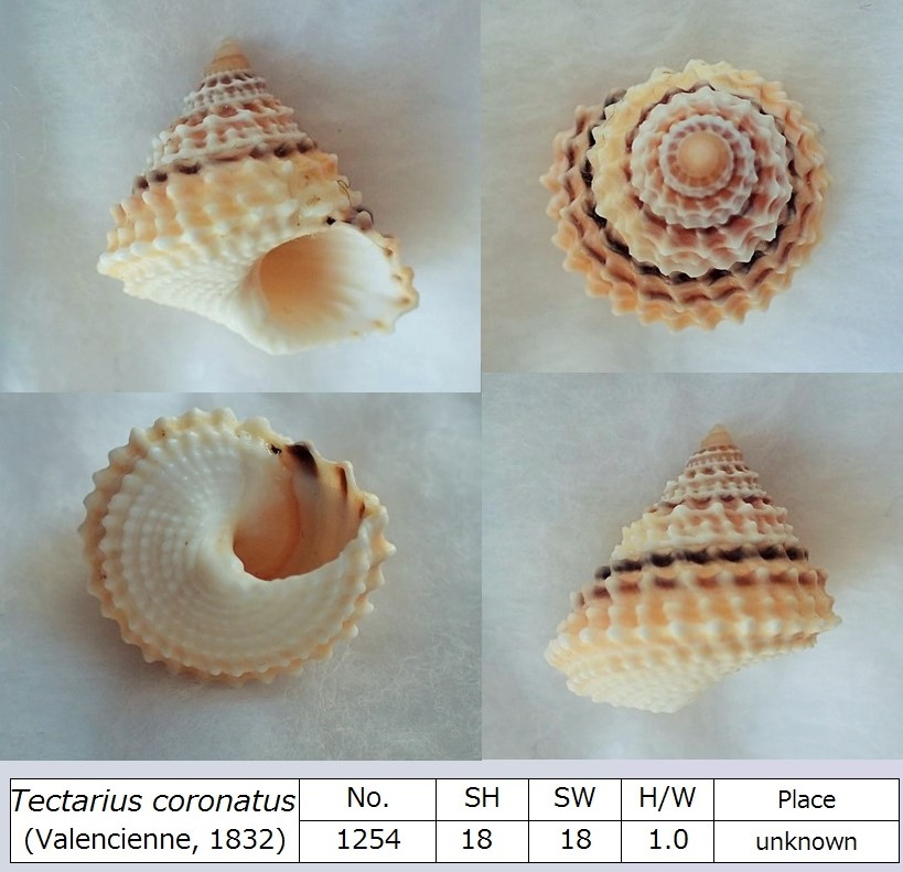 購入品のため産地は不明。